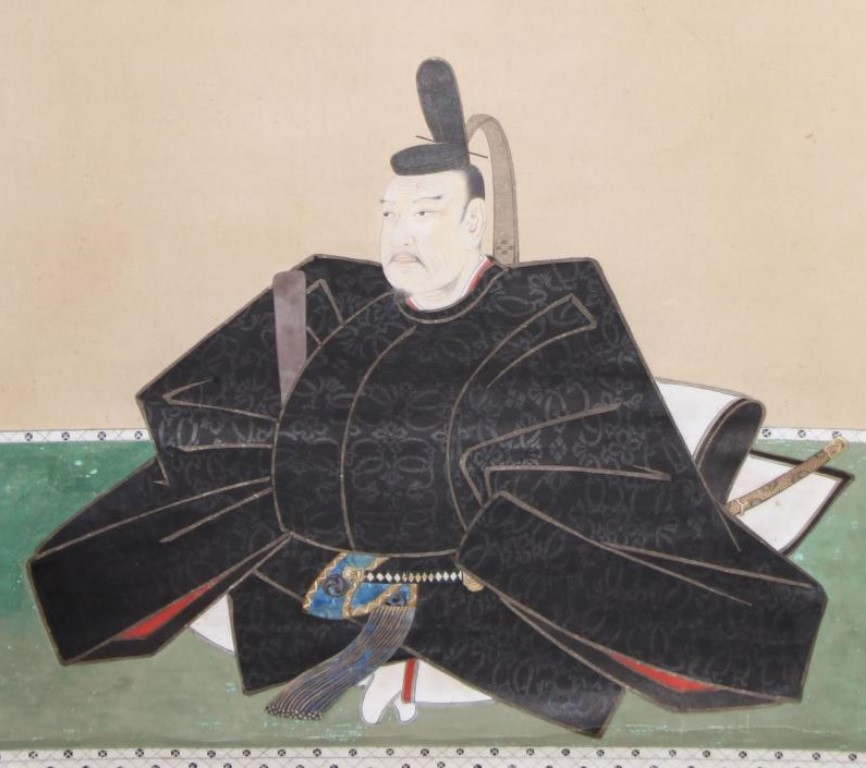 宇都宮信房の肖像。